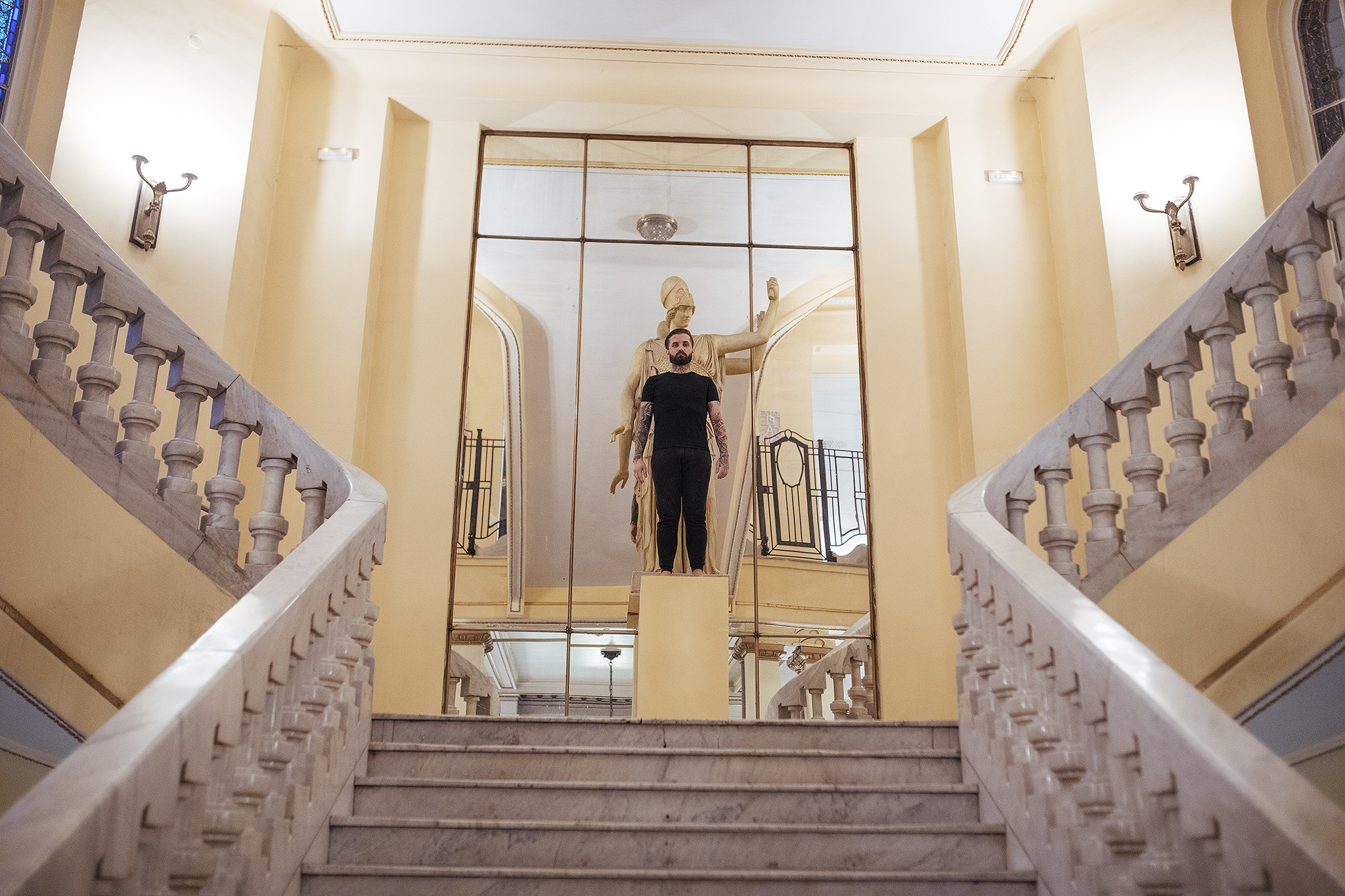 El artista Abel Azcona, retratado en el Círculo de Bellas Artes de Madrid.